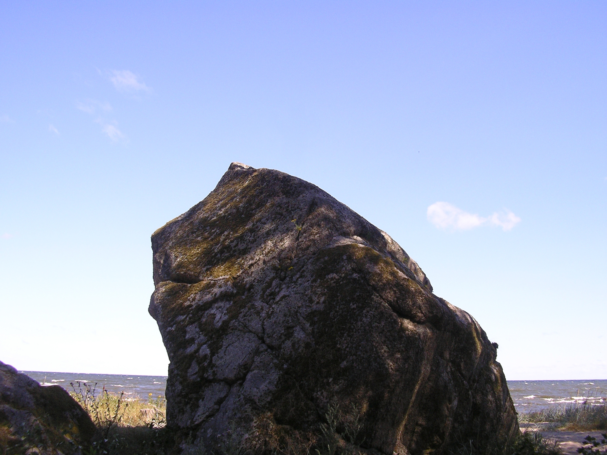 Kaarnakivi Vainupeal